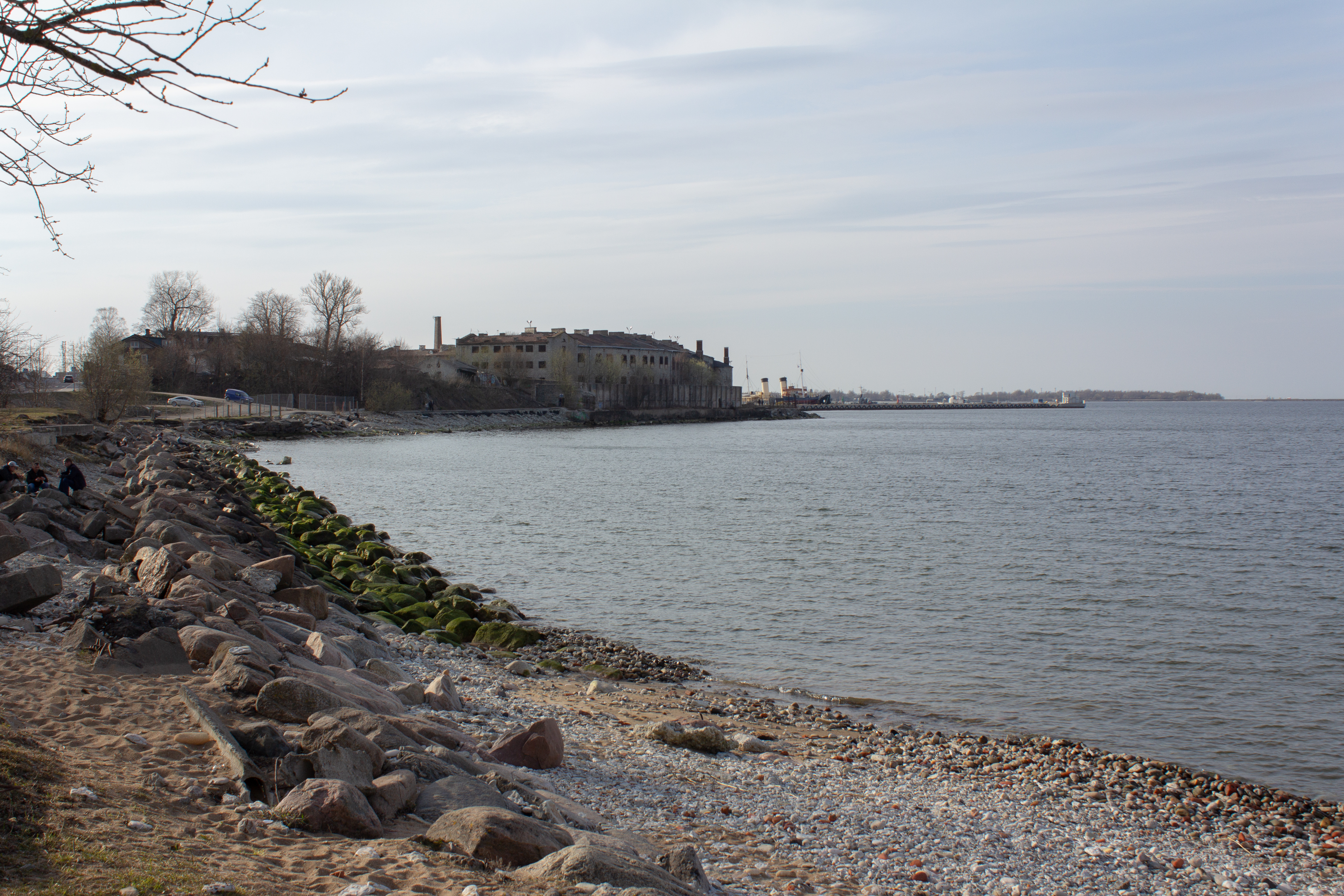 Kalarand, Kalaranna tänav, 19.04.2019. Vaade Patarei suunas